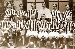 Athletic campeón 1910